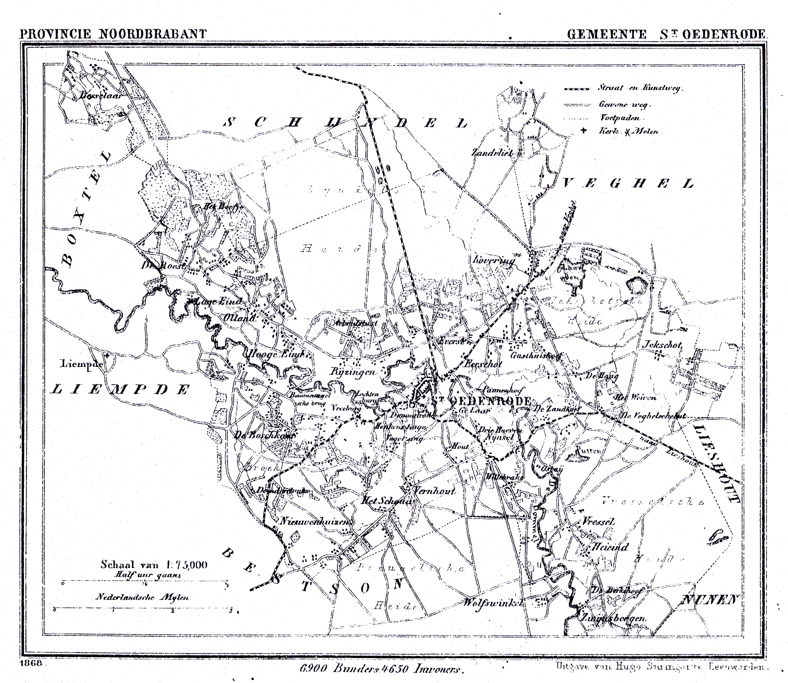 Nederland, Noord-Brabant, Gemeente Sint Oedenrode